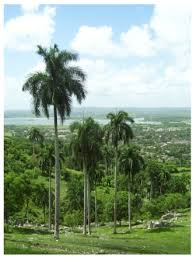 Un típico paisaje de las lomas de Tamarindo